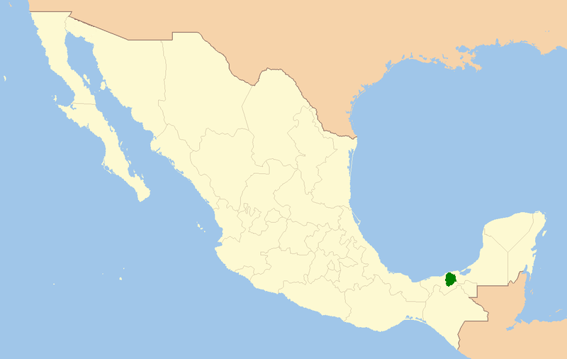 Mapa en donde se muestra la localización de la reserva de la biosfera "Pantanos de Centla" en México.